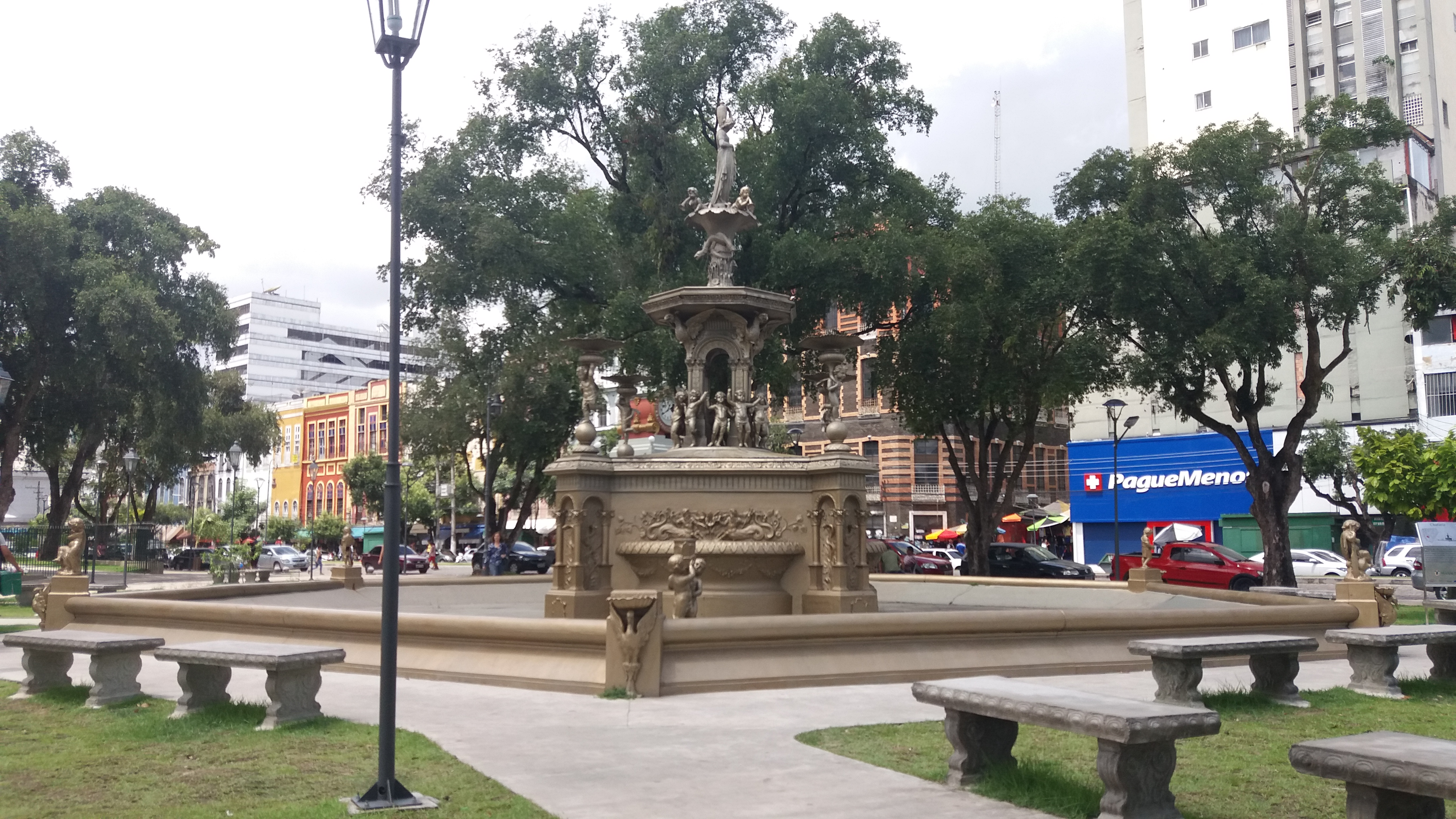 Está localizada no Centro da cidade de Manaus, Amazonas, Brasil.